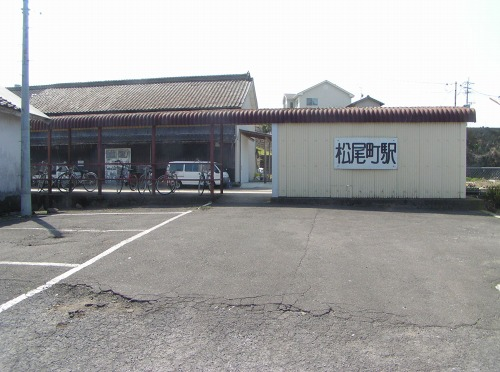 松尾町駅 2007年3月、投稿者が撮影。